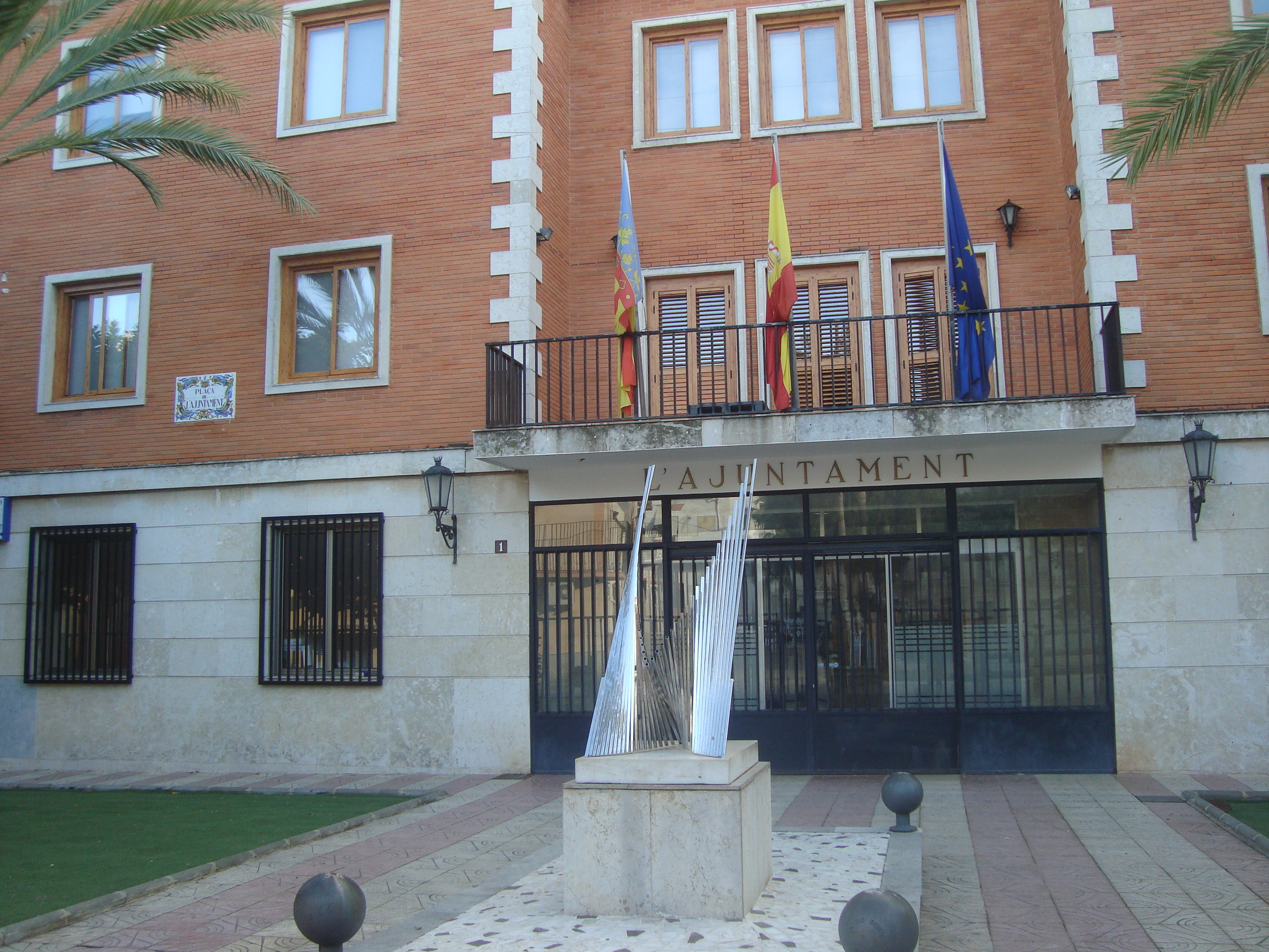 Ajuntament del Puig de Santa Maria